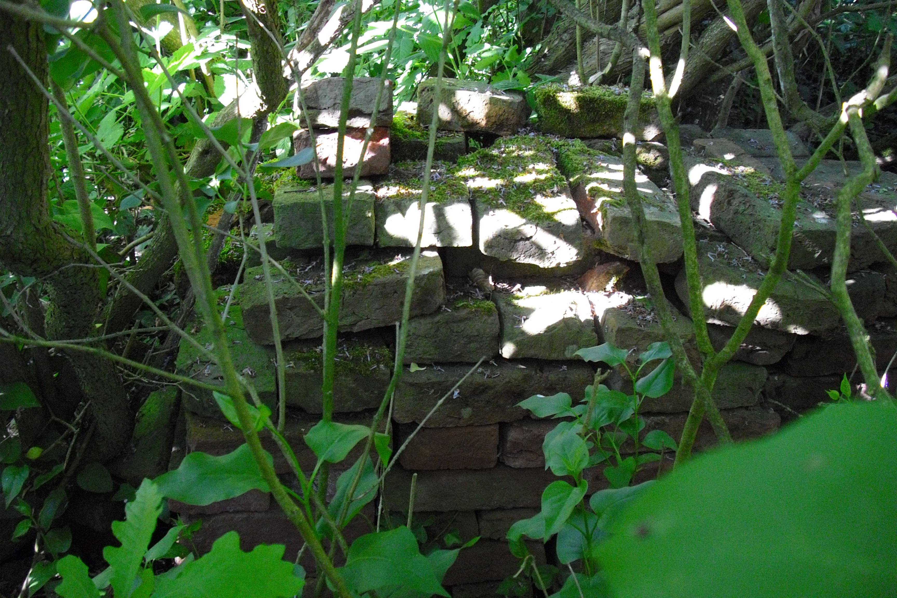 Klosterformatsteine des ehemaligen Klosters Burmönken; gefunden bei Schachtarbeiten auf dem ehemaligen Klostergelände